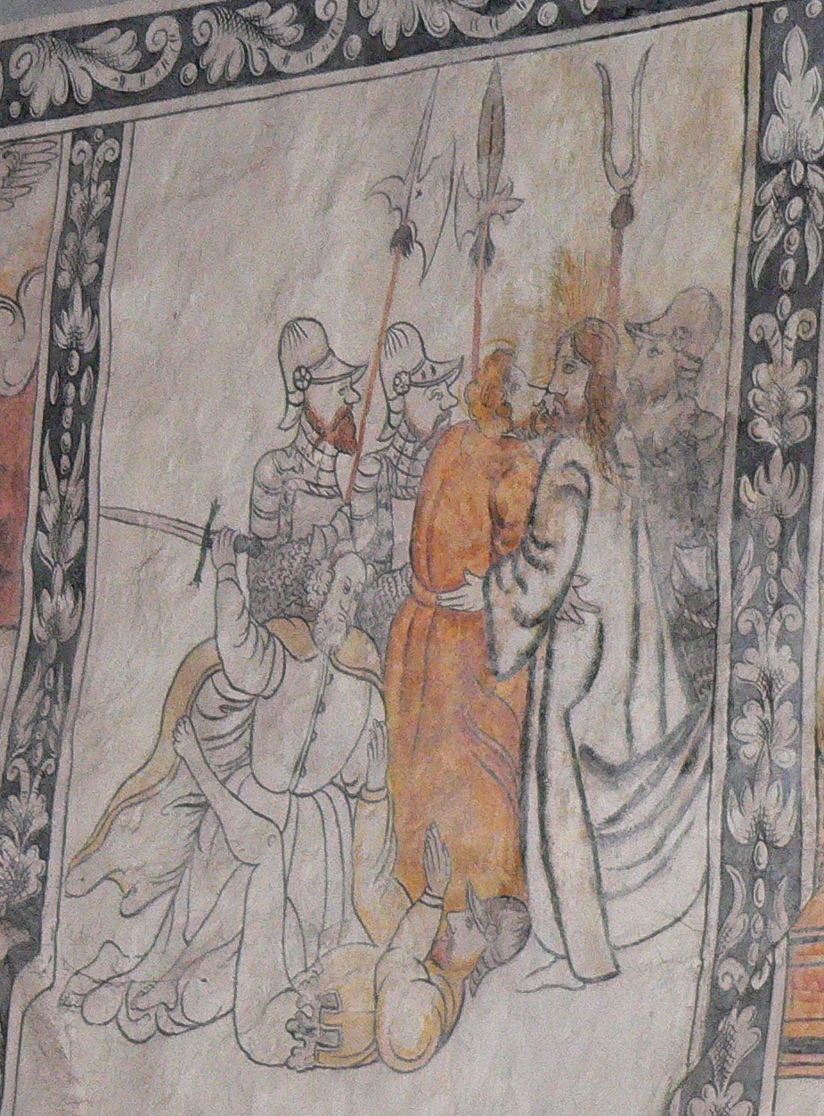 Evangelische Kirche St. Laurentius in Dassel, Niedersachsen, Deutschland - Protestantische Renaissancemalerei (Secco): "Kiss of Judas" von 1577